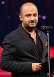 حجت اشتری